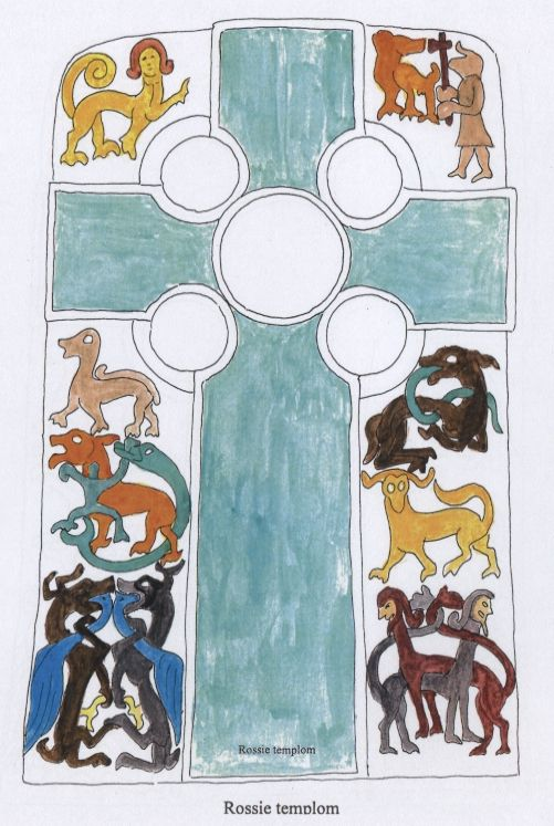 Rossie templom sírköve állatküzdelmi jelenetekkel színezve